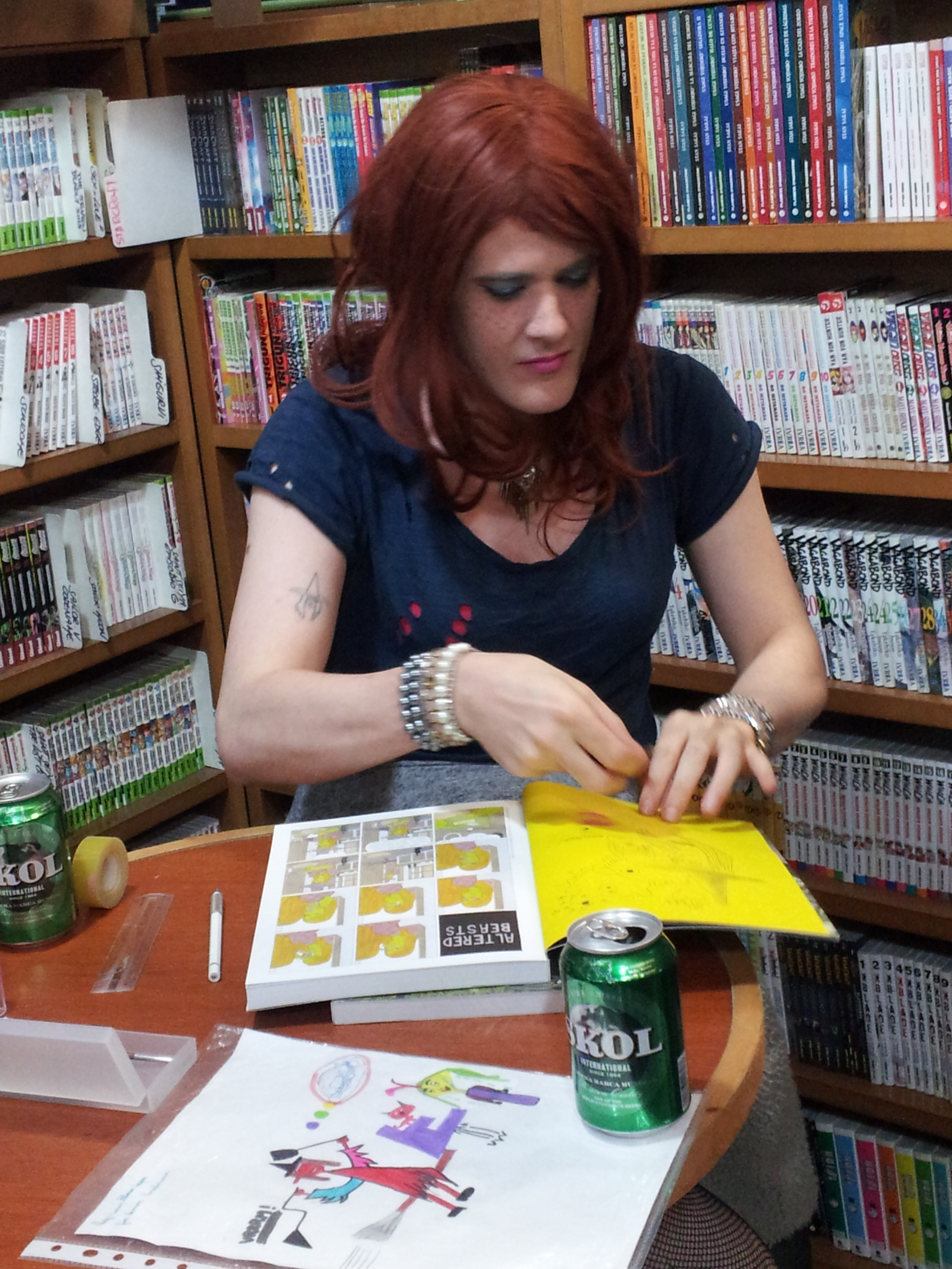 Spanish Tour. Presentació a la llibreria Futurama dels seus còmics, editats per Fulgencio Pimentel.